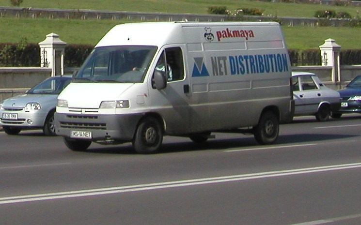 Peugeot Boxer Mk I